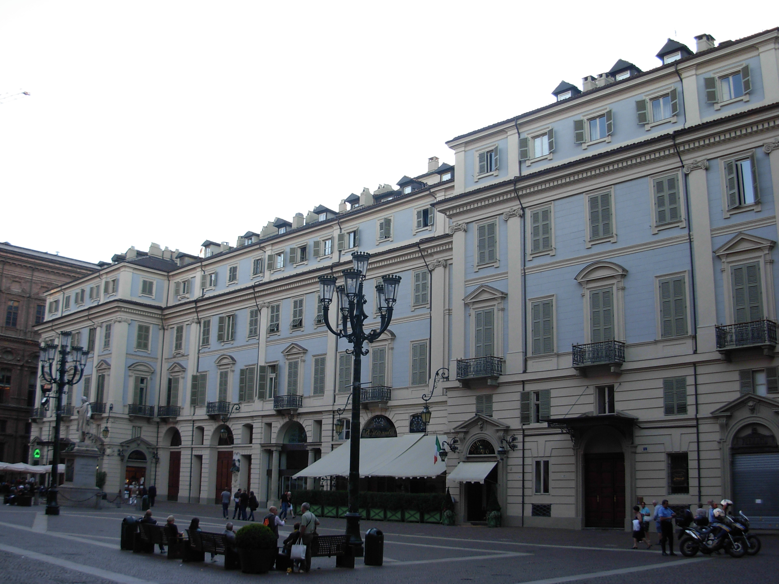 Torino, il teatro Carignano, settembre 2012.